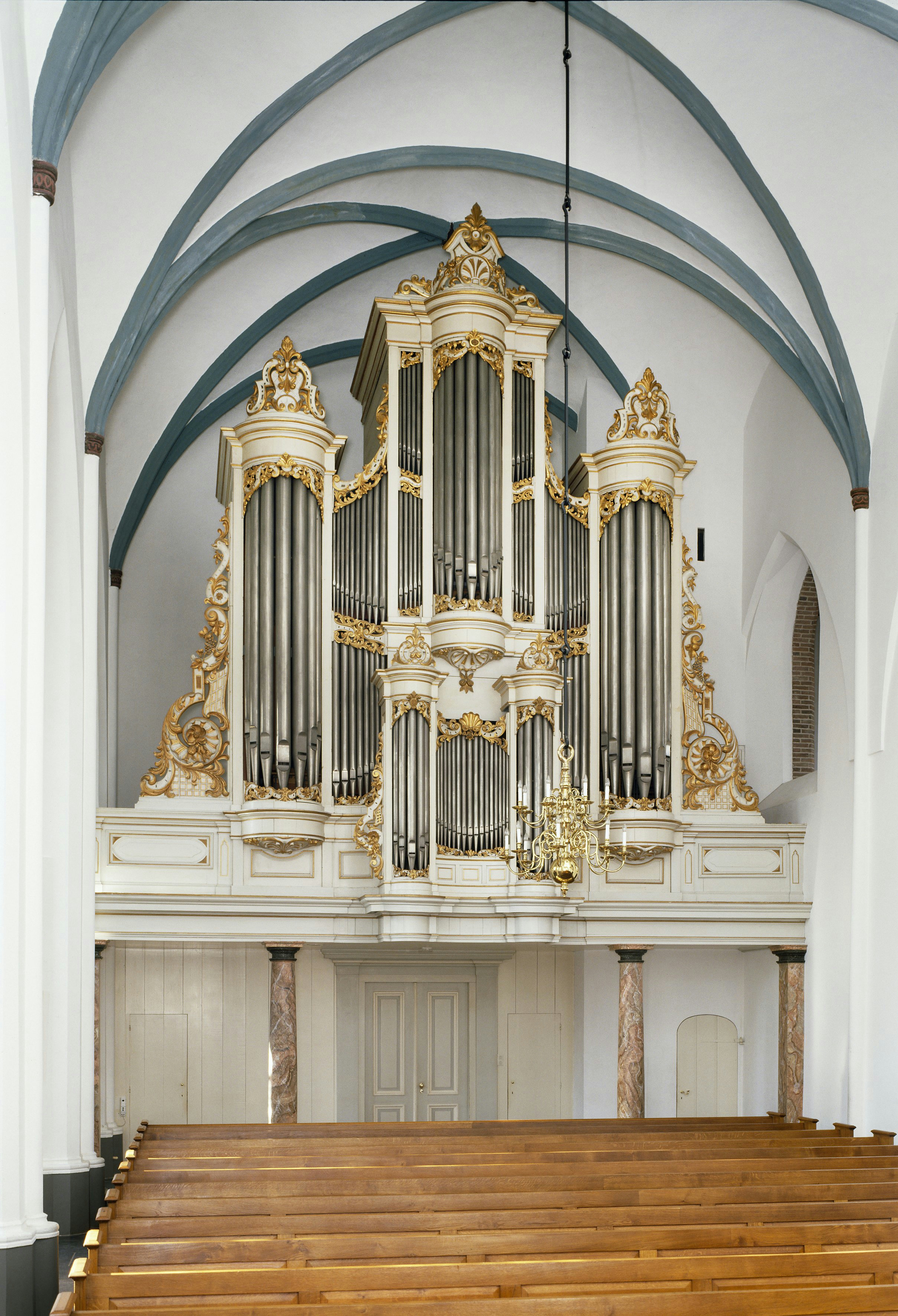 Hervormde Oude Kerk: Intenieur, aanzicht orgel, orgelnummer 401 (opmerking: Gefotografeerd voor Het Historische Orgel in Nederland 1872-1878, bladzijde 325)